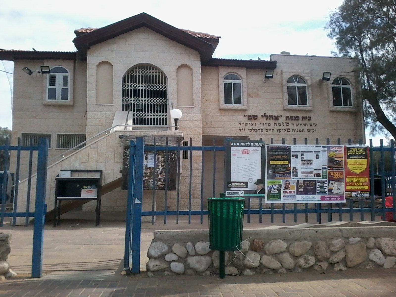 בית הכנסת "אהלי שם", במתחם השוק הישן בנתיבות, על שם הרב שלמה מזוז ז"ל.